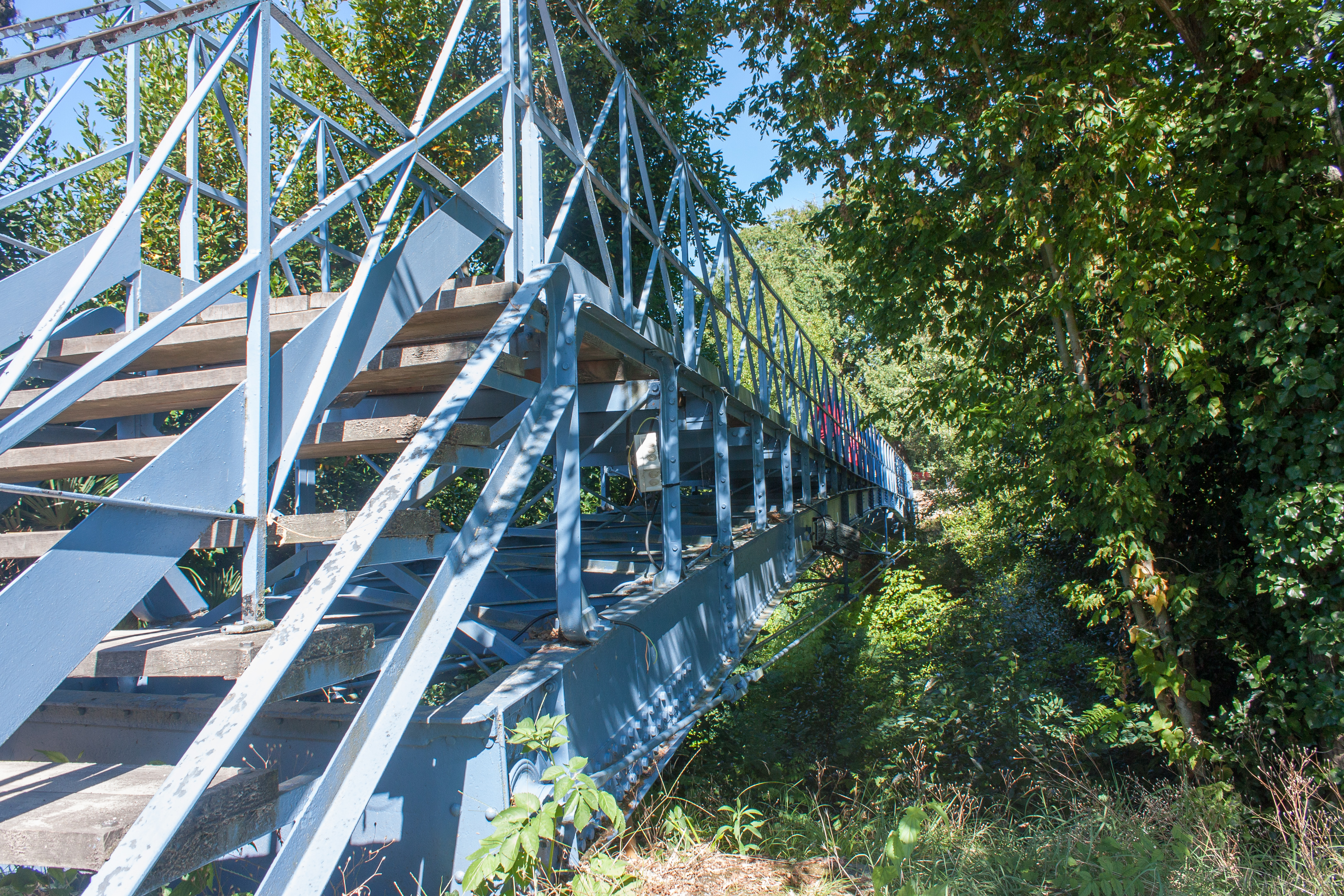 Passerelle métallique qui fait le lien entre la dune Saint-Paul et celle de Sainte-Cécile. Réalisé par Paul Régnauld en 1862.